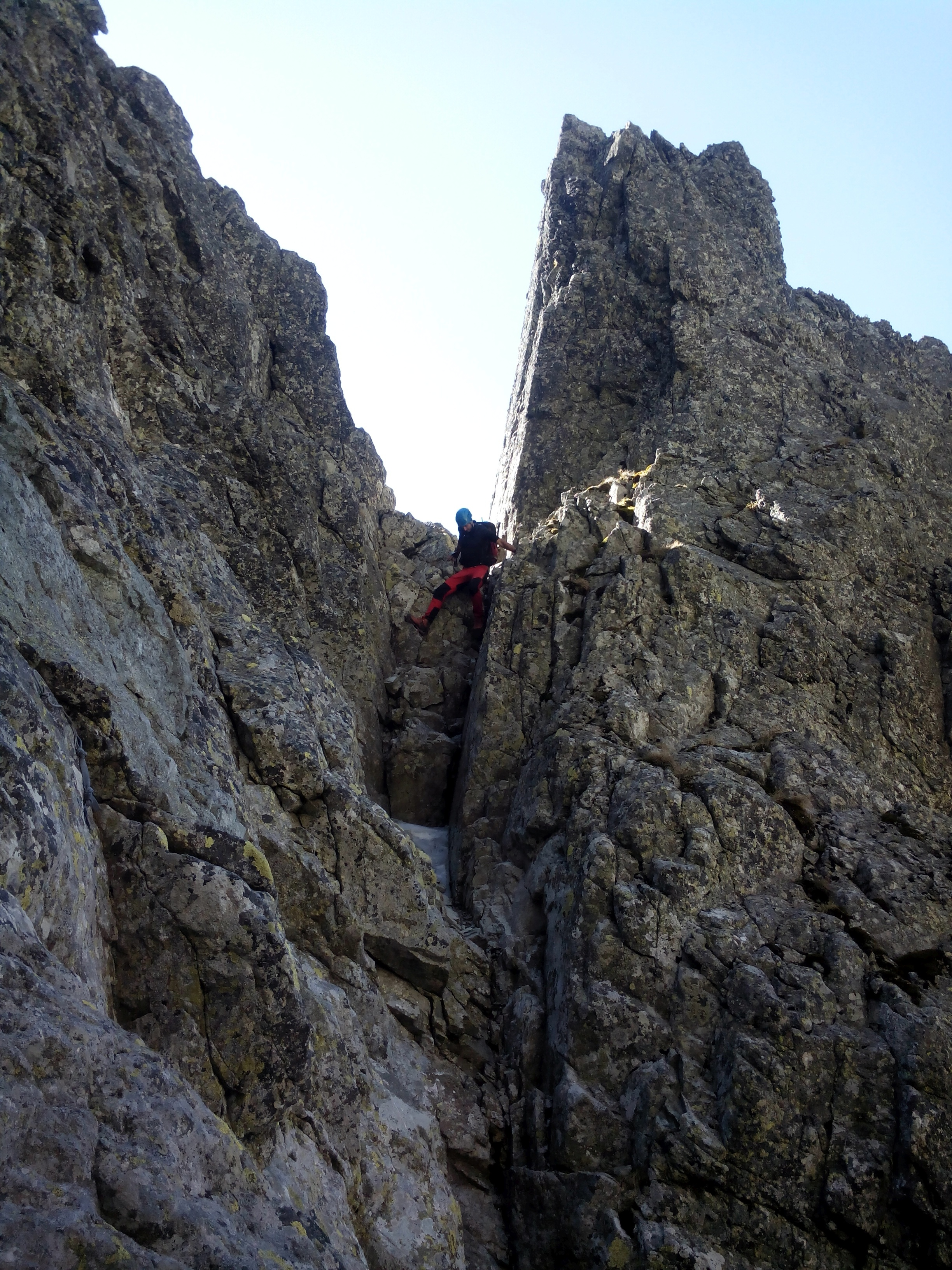 Wejście na Staroleśny Szczyt